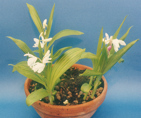 Bletilla striata alba